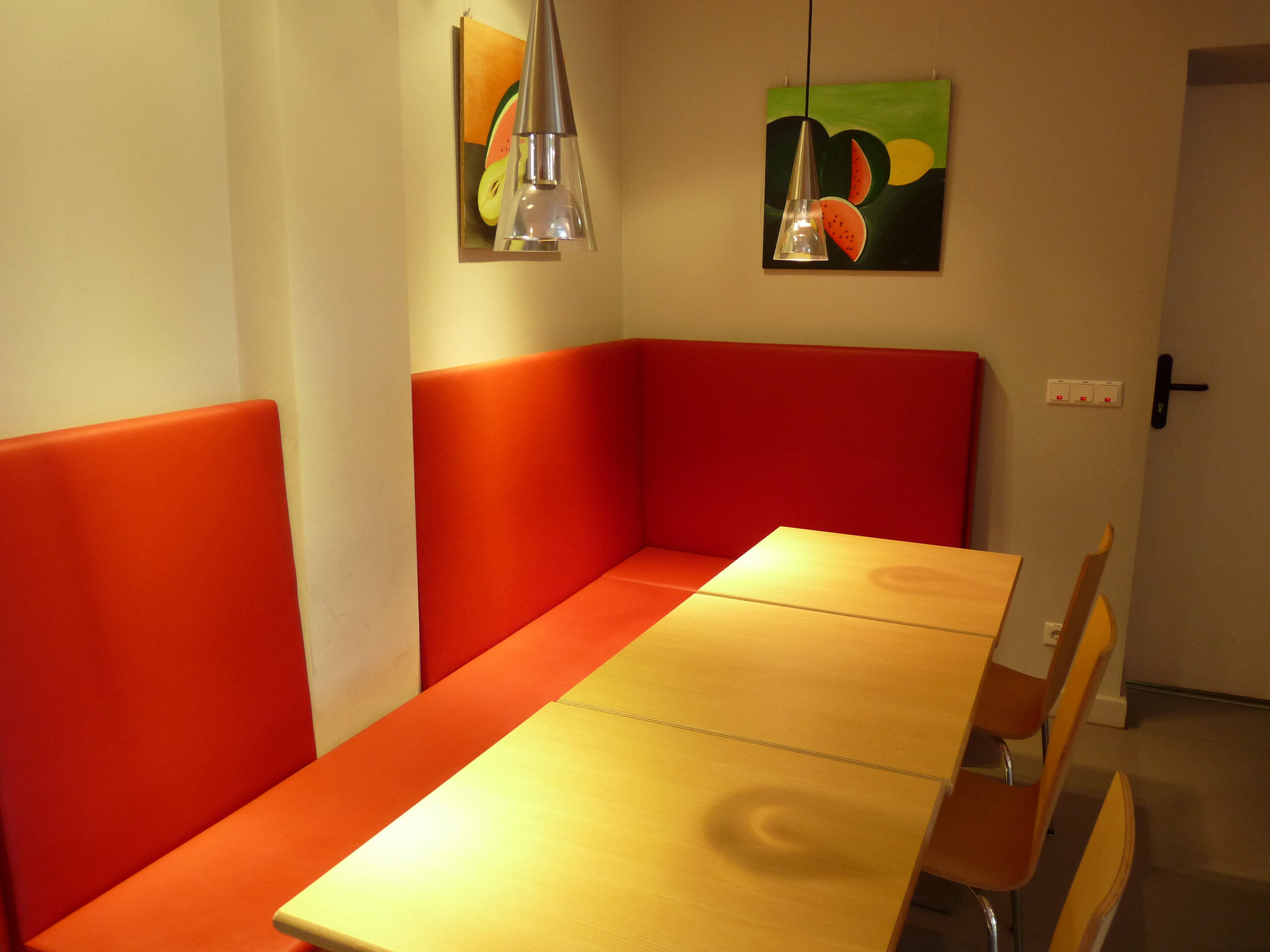 Ausschnitt der Mensa der Hildegard-Wegscheider-Oberschule